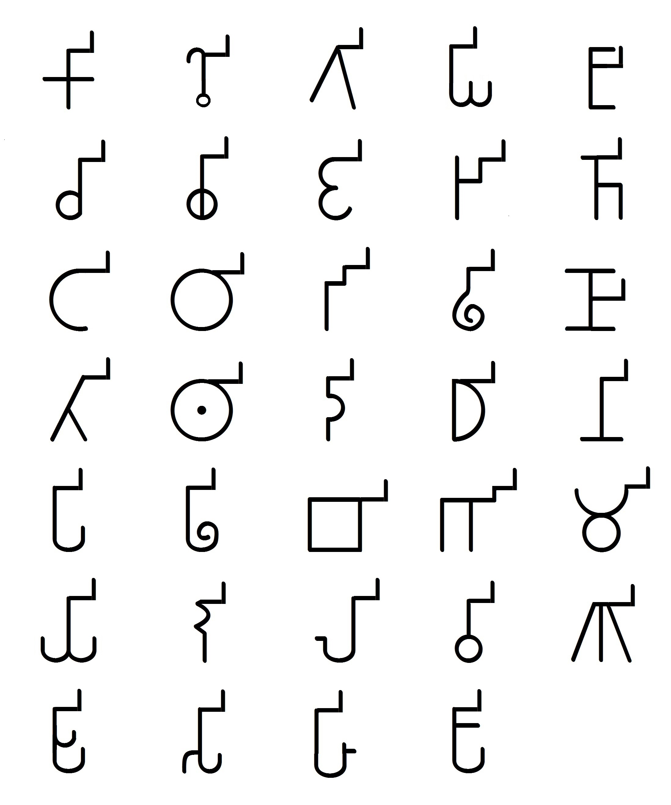 ब्राम्हि व्यंजनांचे इ-कार (ऱ्हस्व वेलांटी)